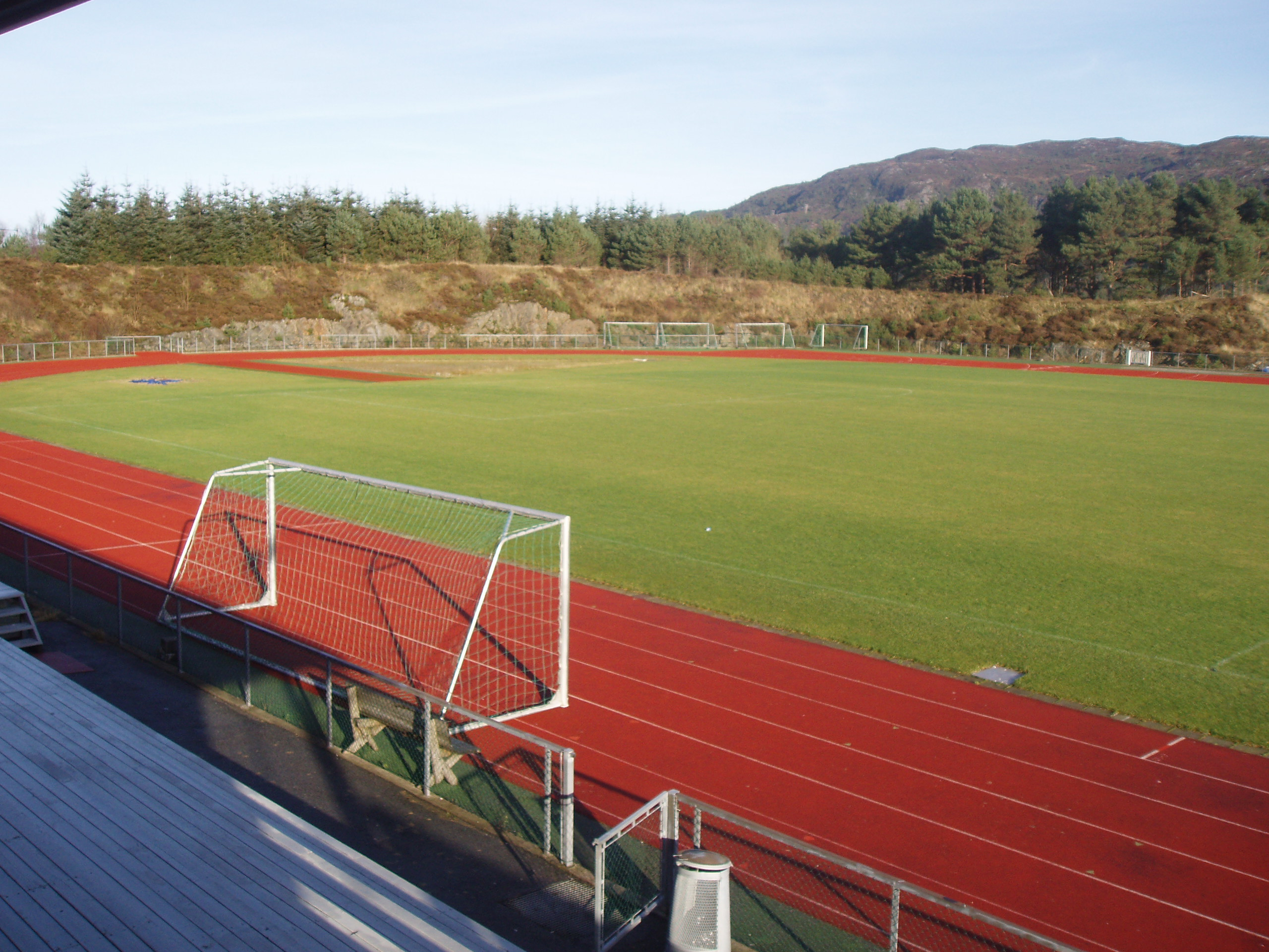 Fitjar idrettspark.